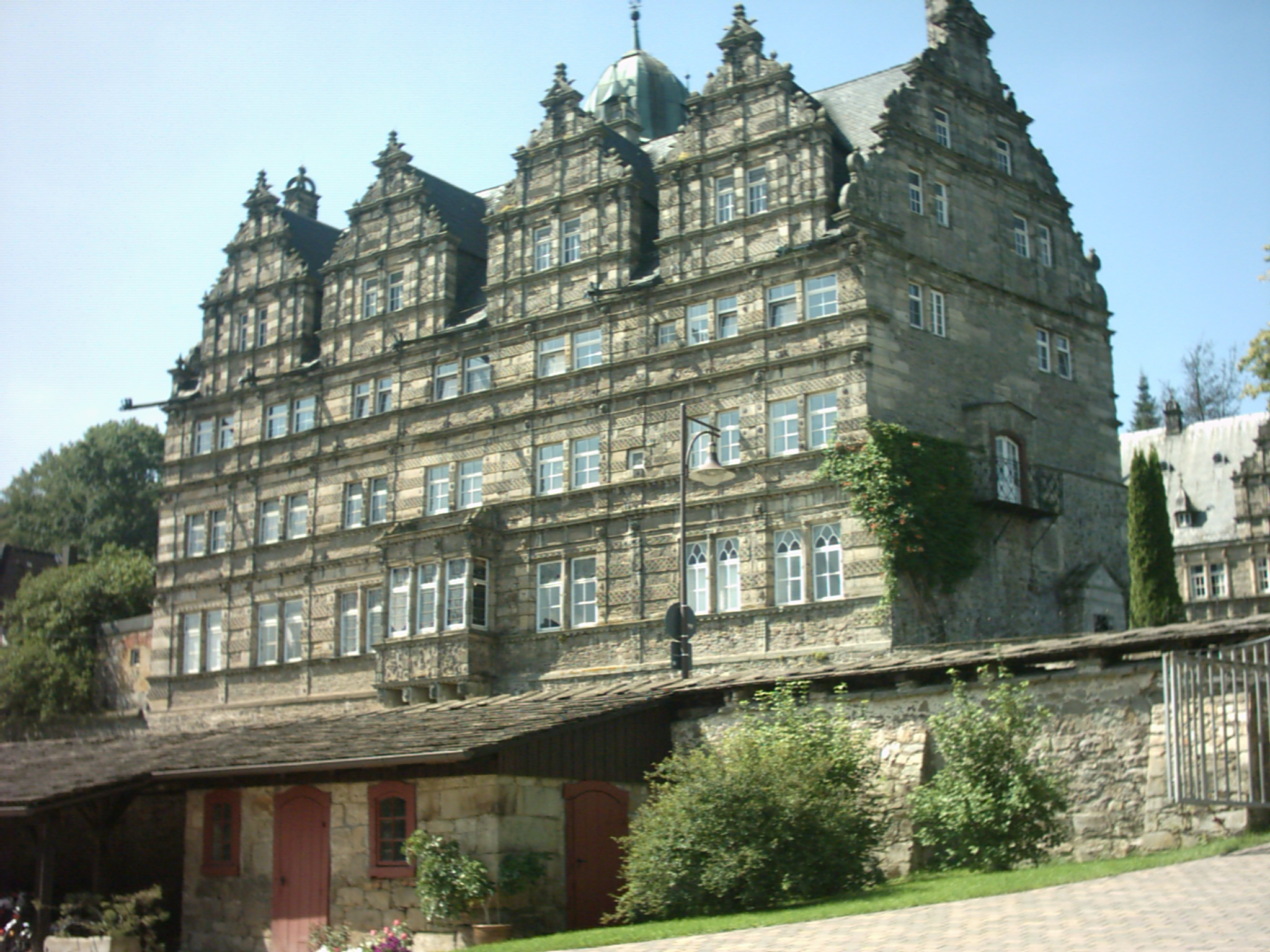 Schloss Hämelschenburg, Hauptwerk der Weserrenaissance